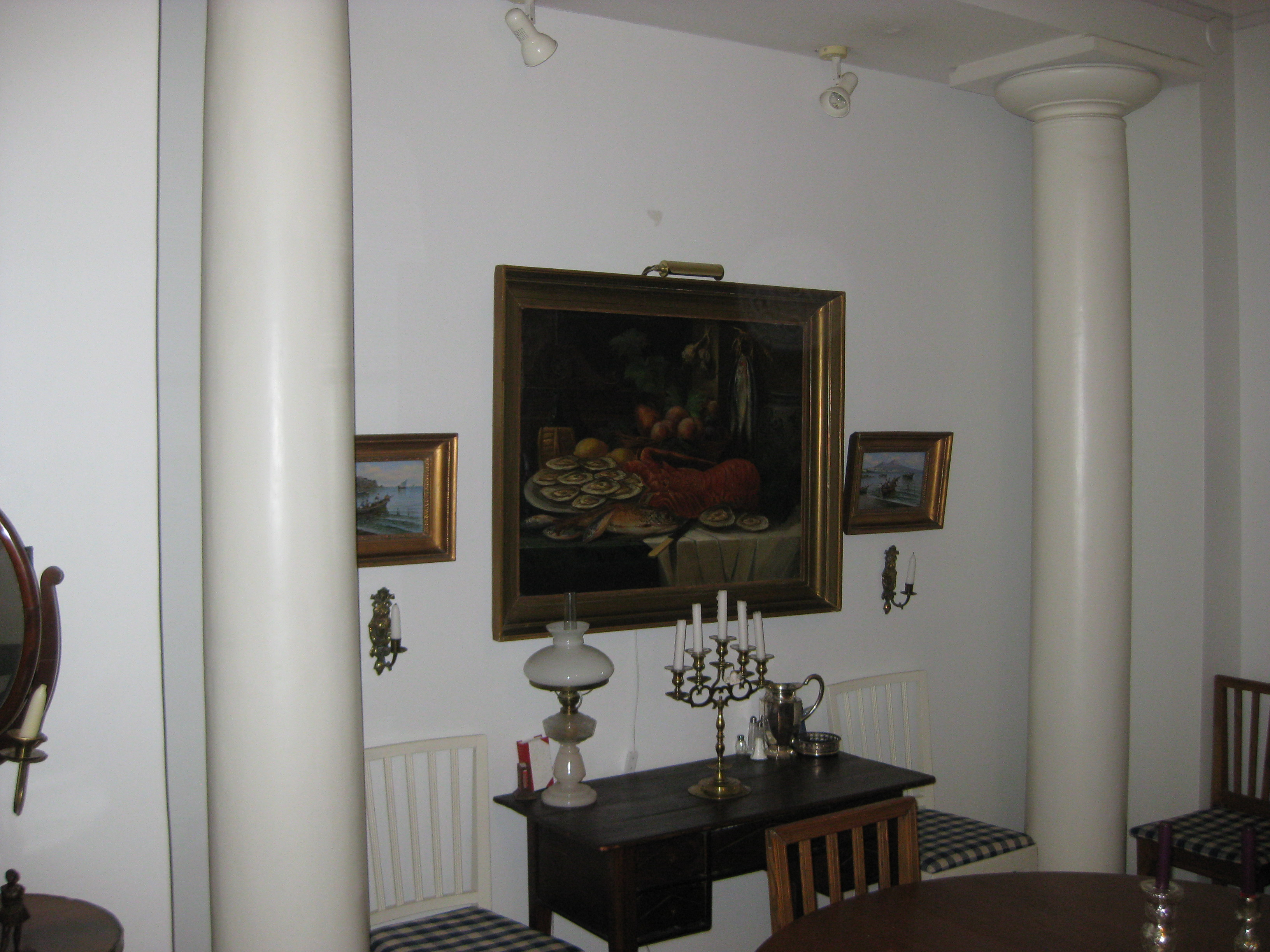 Kaskenlinna, Åbo